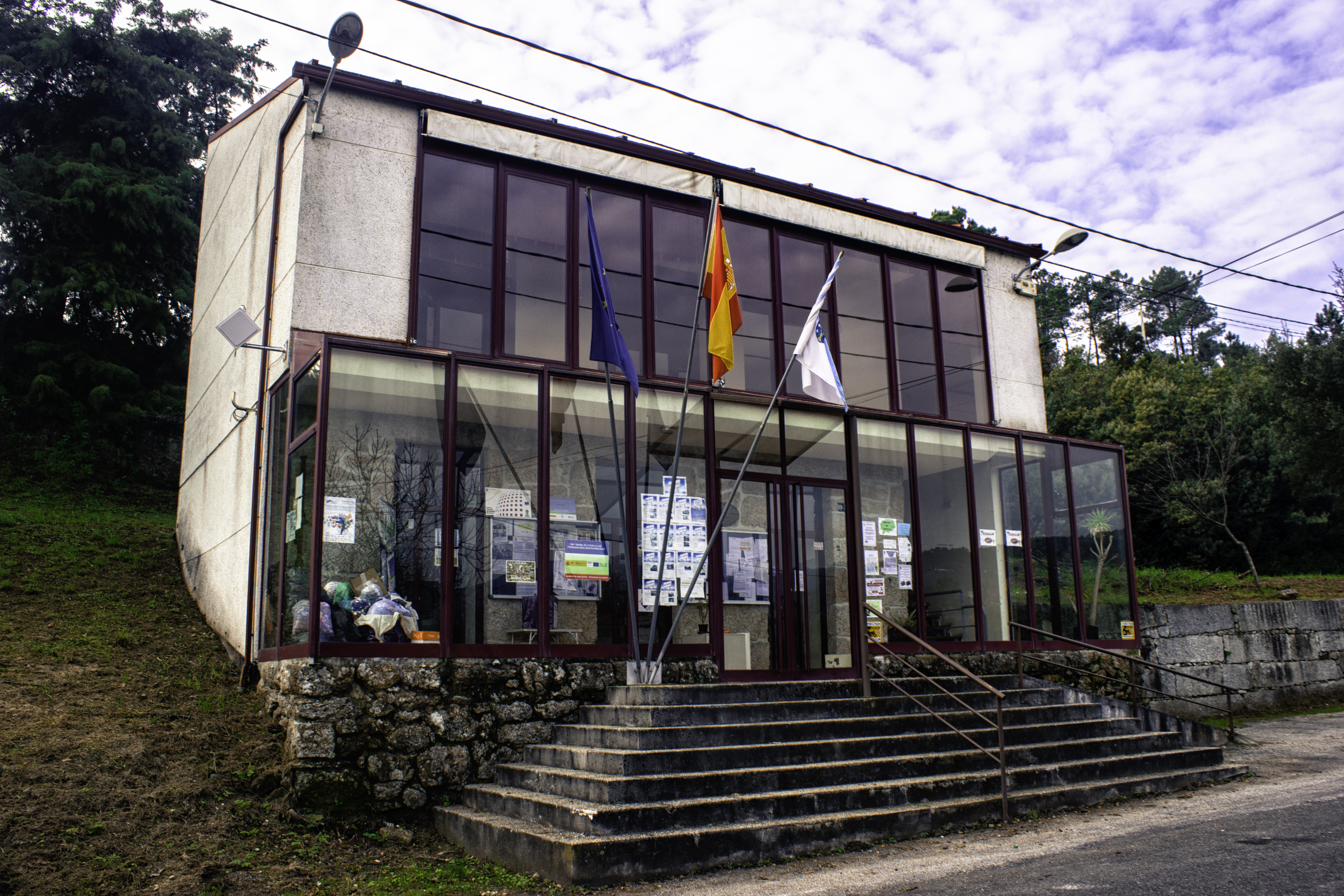 Casa do concello de Cenlle, na provincia de Ourense.